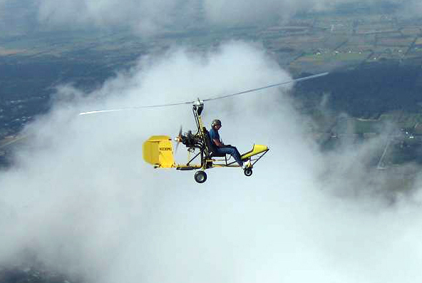 Bensen B-8MG gyrocopter (N36MG?) built by Mike Gaspard